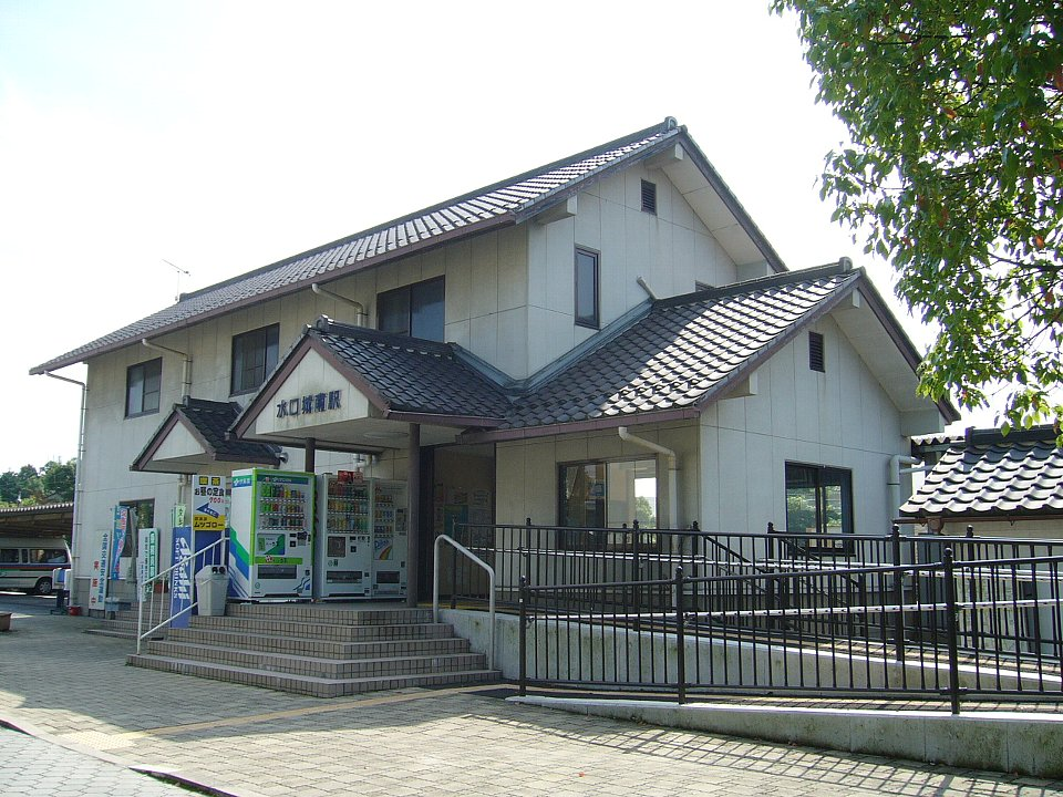 近江鉄道水口城南駅